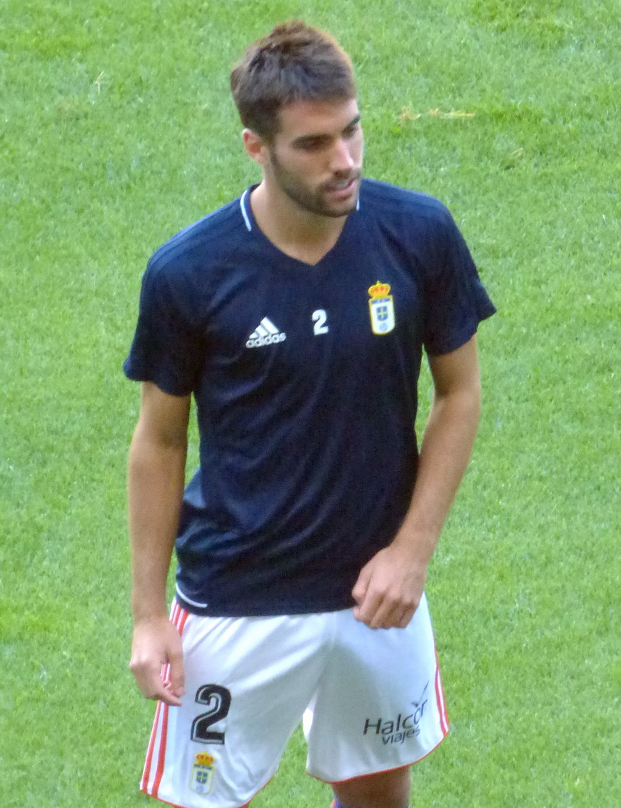 Diego Johannesson durante un calentamiento previo a un partido de la liga 2017-18